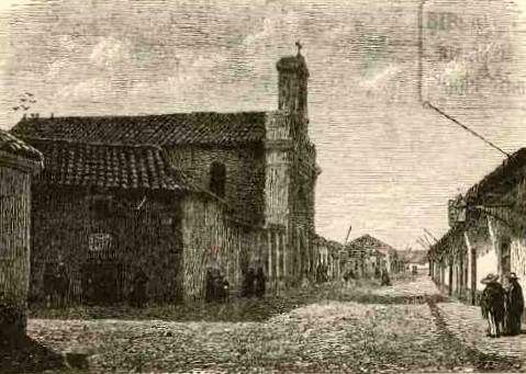 Santiago - Casa de Pedro Valdivia i Capilla de Vera Cruz (1872)